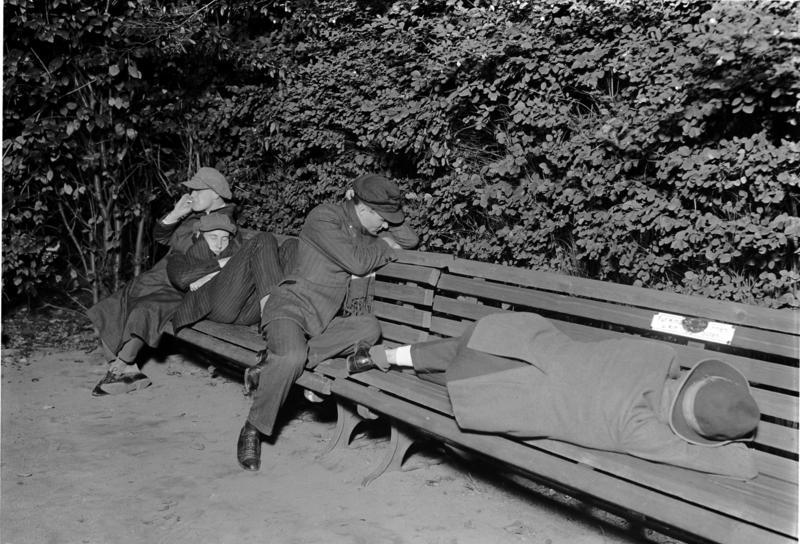 Mit Kamera und Blitzlicht durch die nächtliche Grosstadt Berlin ! Die nächtliche Grosstadt bietet dem Photo-Reporter vielerlei Objekte für seine Kamera. Mit dem Beginn der wärmeren Jahreszeit entwickelt sich in den abgelegenen Strassen und Parks der Grosstadt das Nachtleben der Obdachlosen und sonstige das Tageslicht scheuende Gestalten. "Die Penner" auf der Tiergartenbank, ein Nacht-Asyl, welches bei den jetzt wärmer werdenden Tagen vielem lichtscheuen Gesindel als Ruhestätte dient.